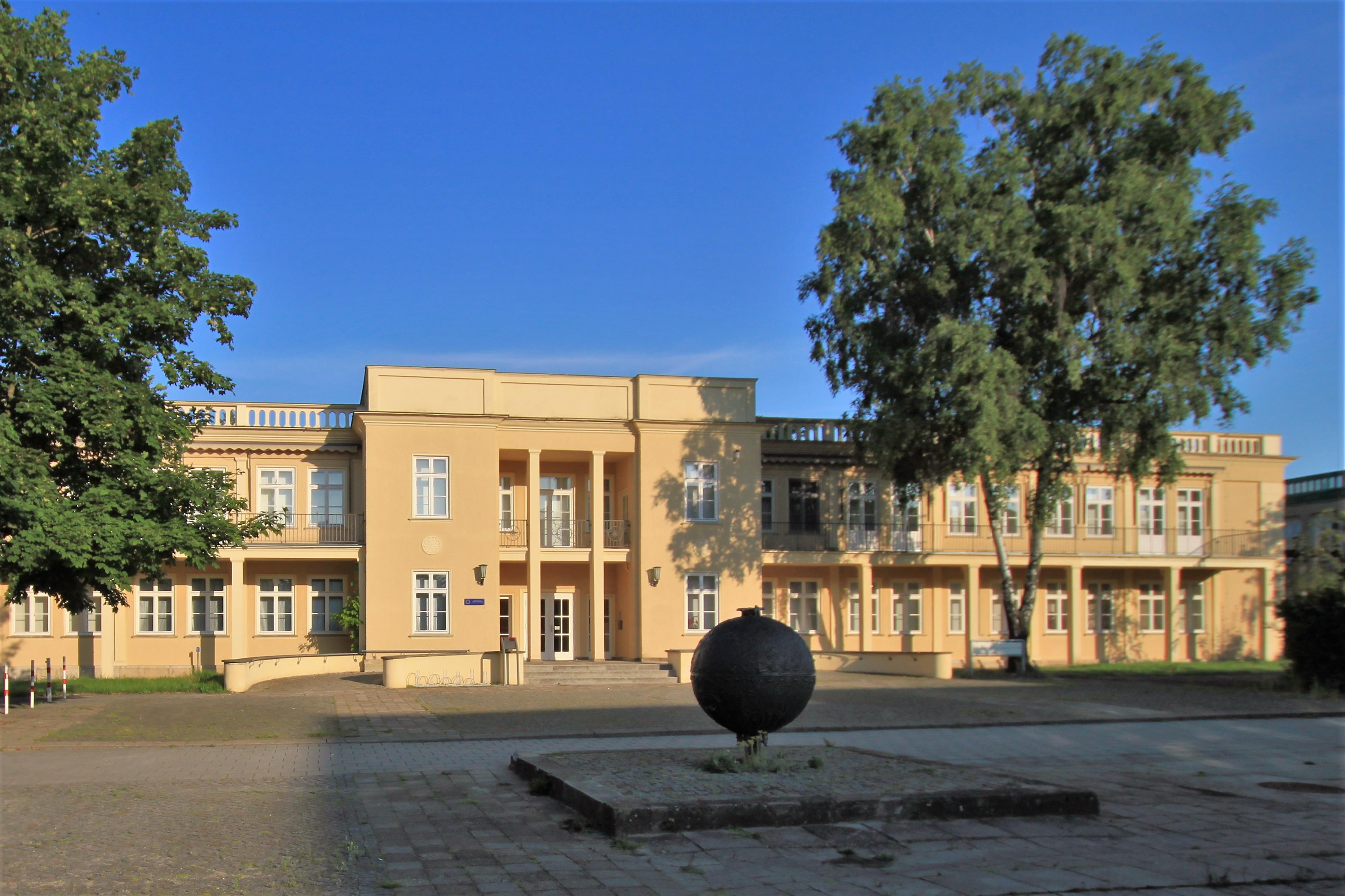 Kindergarten in der Erich-Weinert-Allee, ehem. Kindergarten II im II. Wohnkomplex